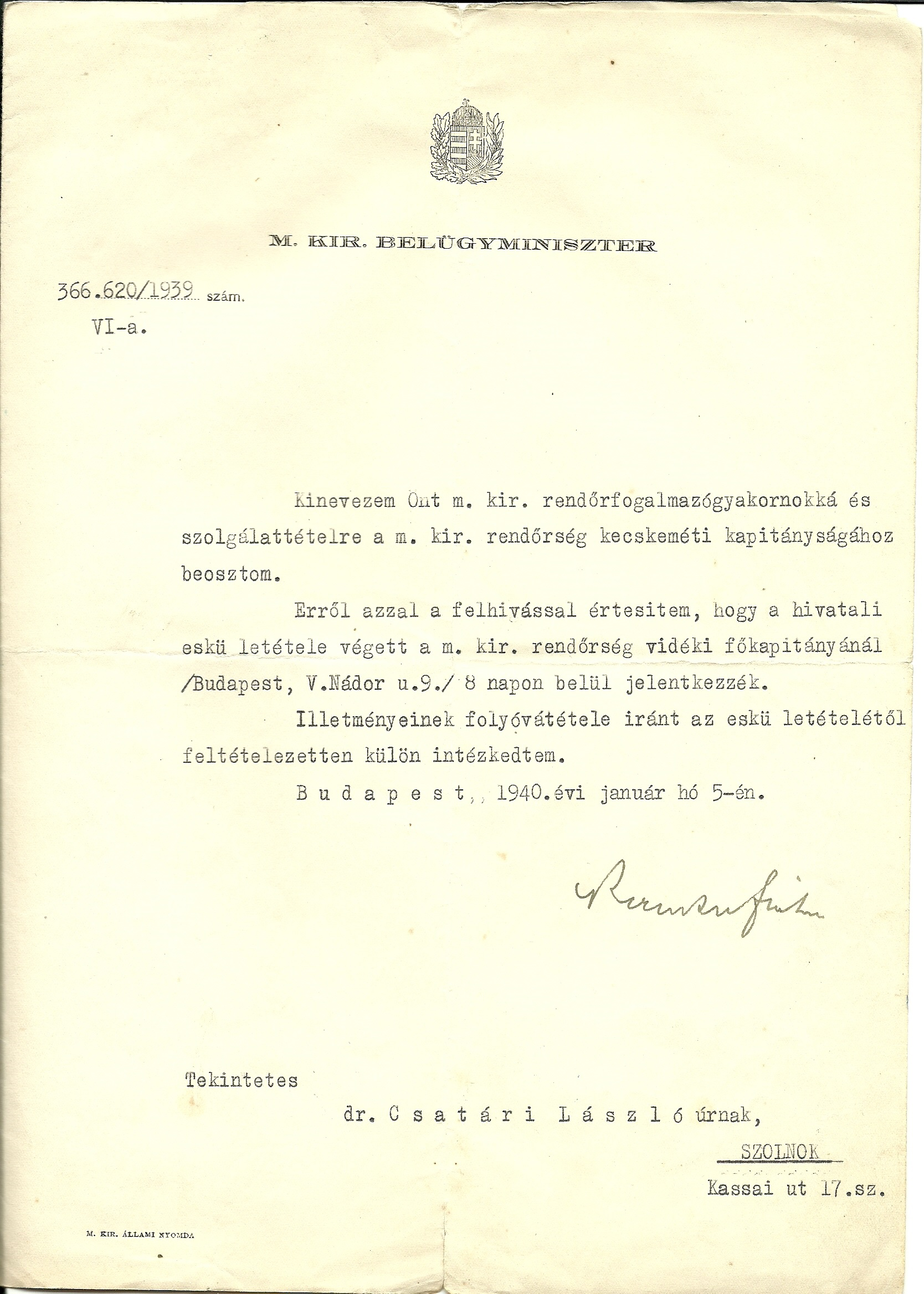 Csatáry László M.kir. BM. rendőrfogalmazó-gyakornok kinevezési parancsa 1940. január 5.